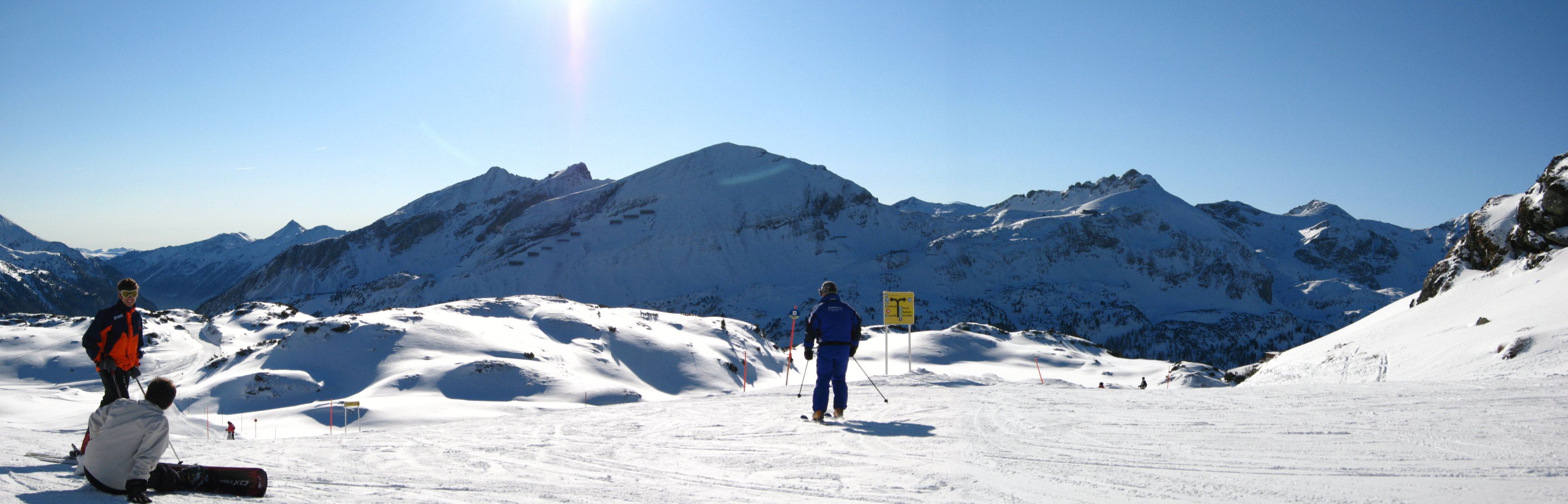 Panorama von Obertauern (Piste, Dez 06)